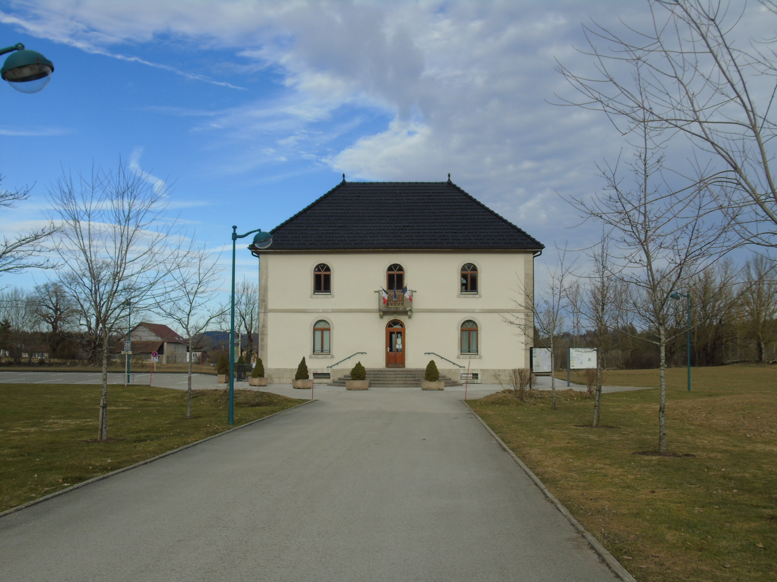 Mairie de Franbouhans, Doubs, France